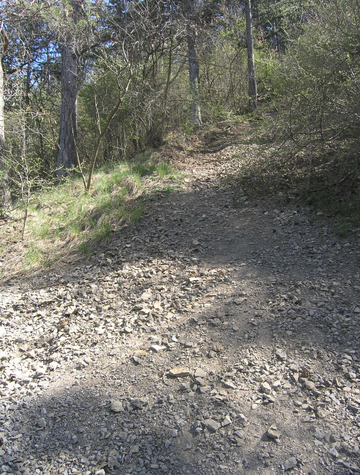 Nature reserve Ortocerový lůmek Přírodní památka Ortocerový lůmek